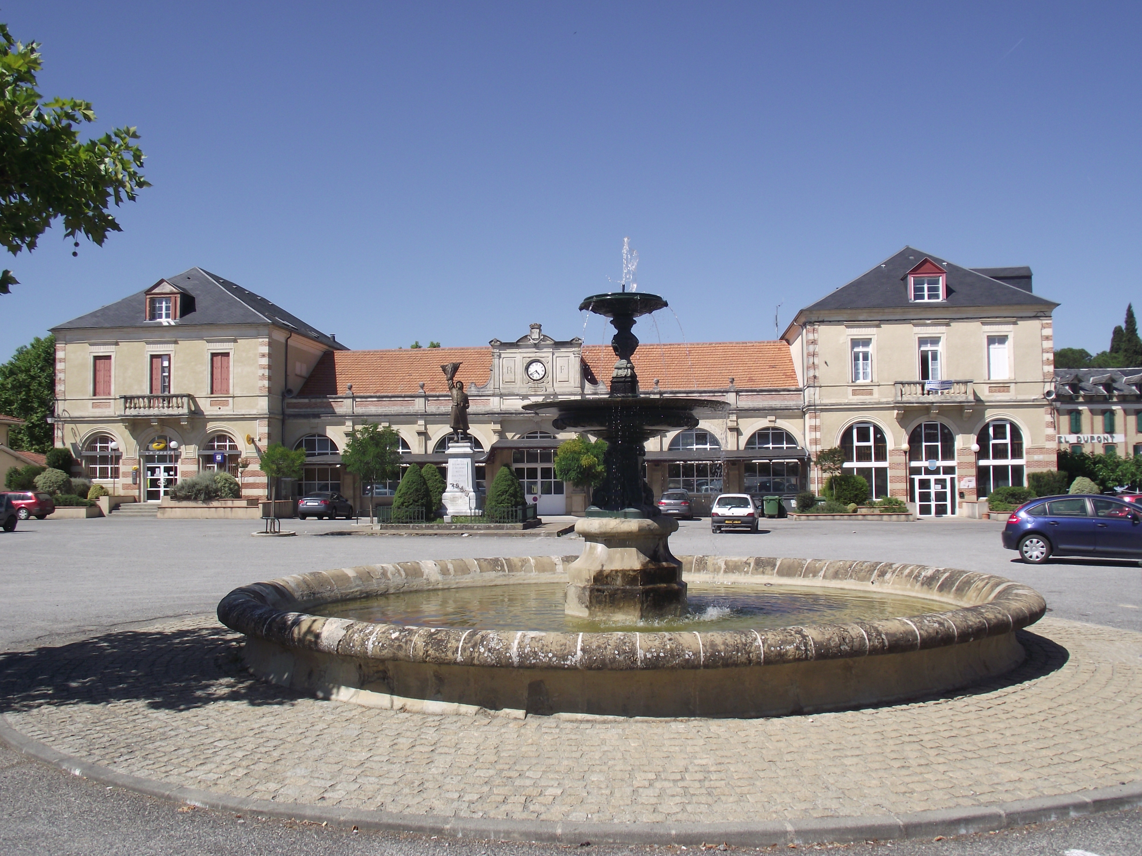 Fontaine de la place de l'Estelette à Castelnau-Magnoac (Hautes-Pyrénées, France)